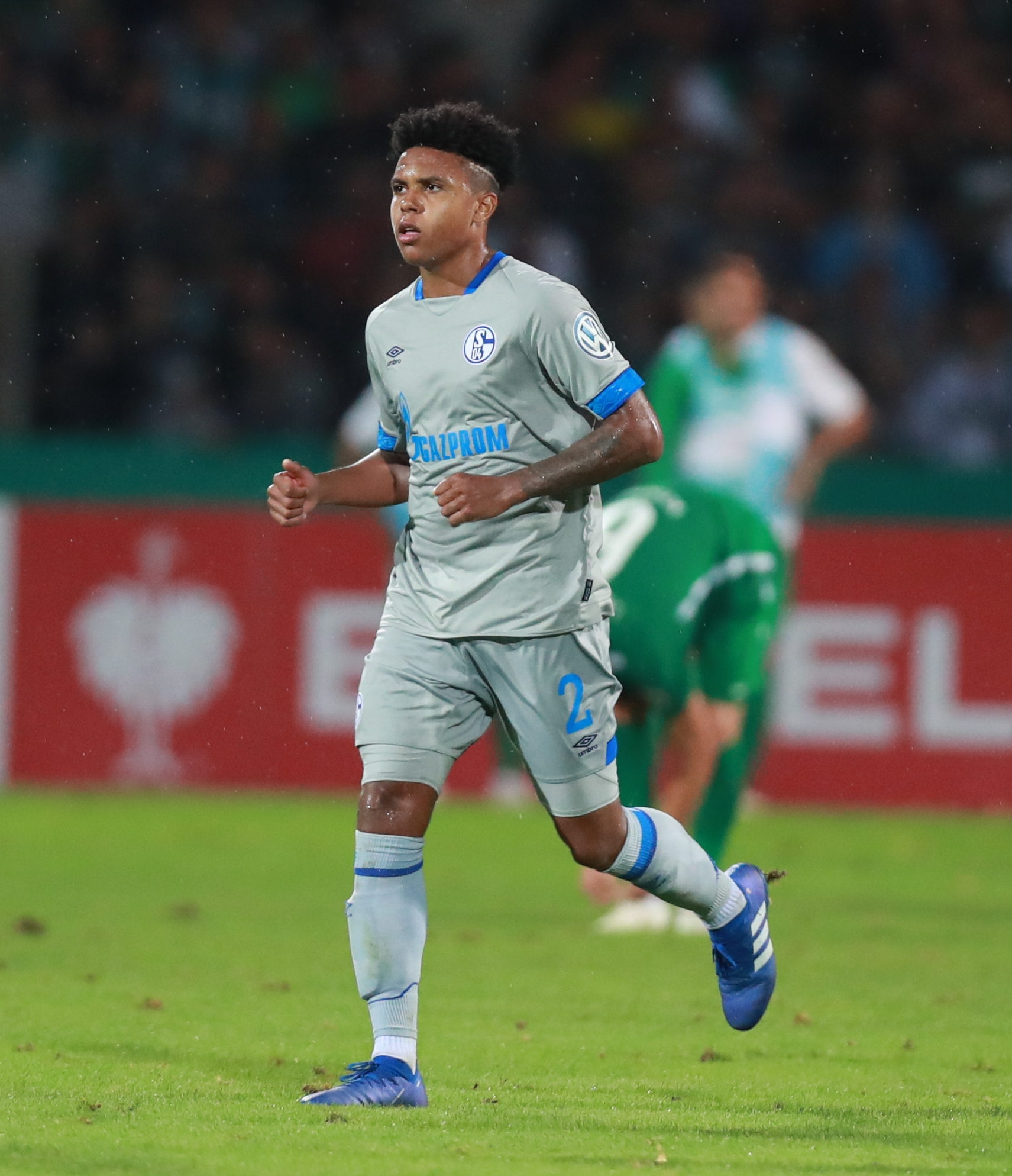 DFB-Pokal 2018/19, 1. Hauptrunde: 1. FC Schweinfurt 05 gegen FC Schalke 04 0:2 (0:1)